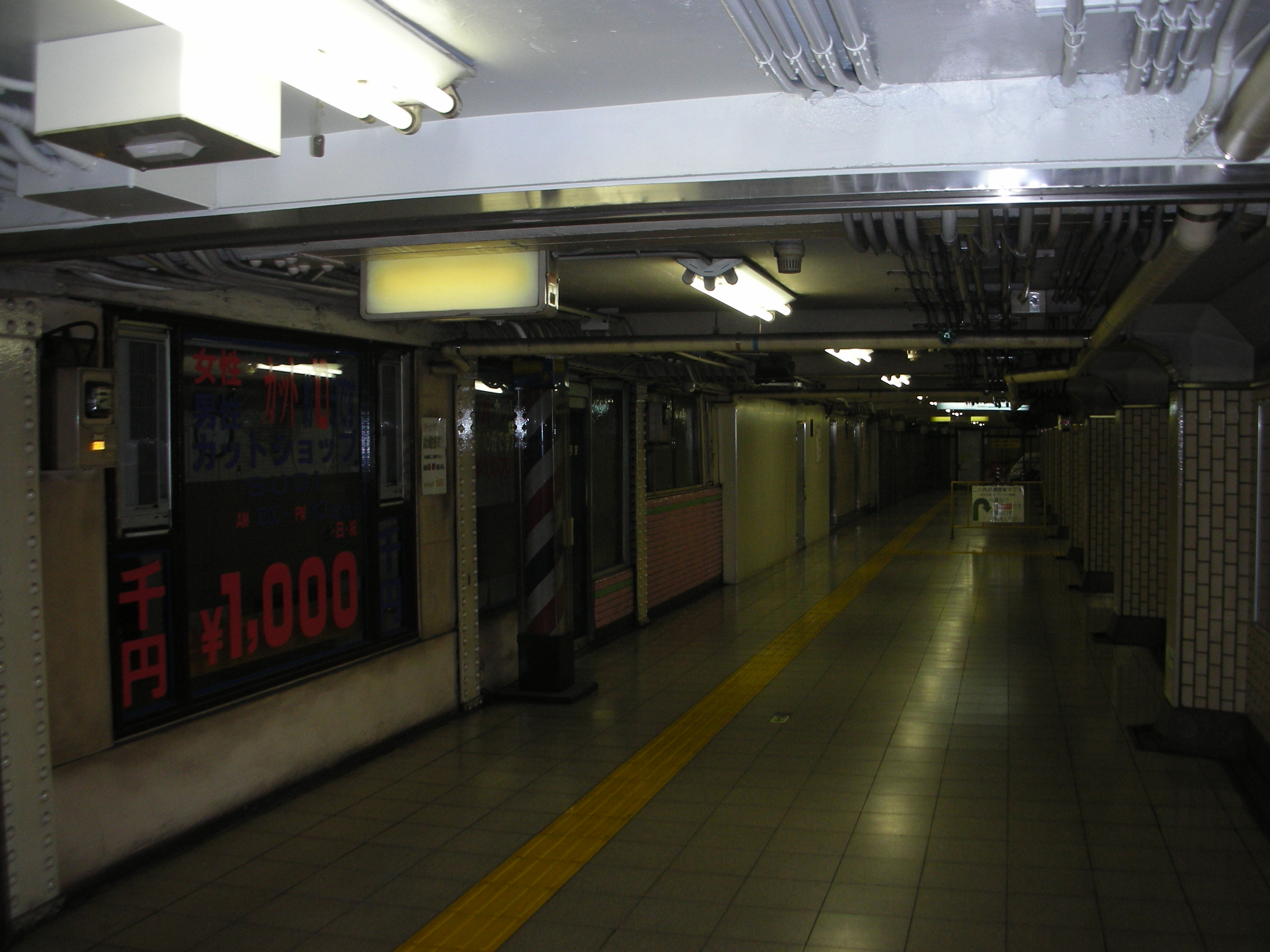 神田須田町地下鉄ストアの外観